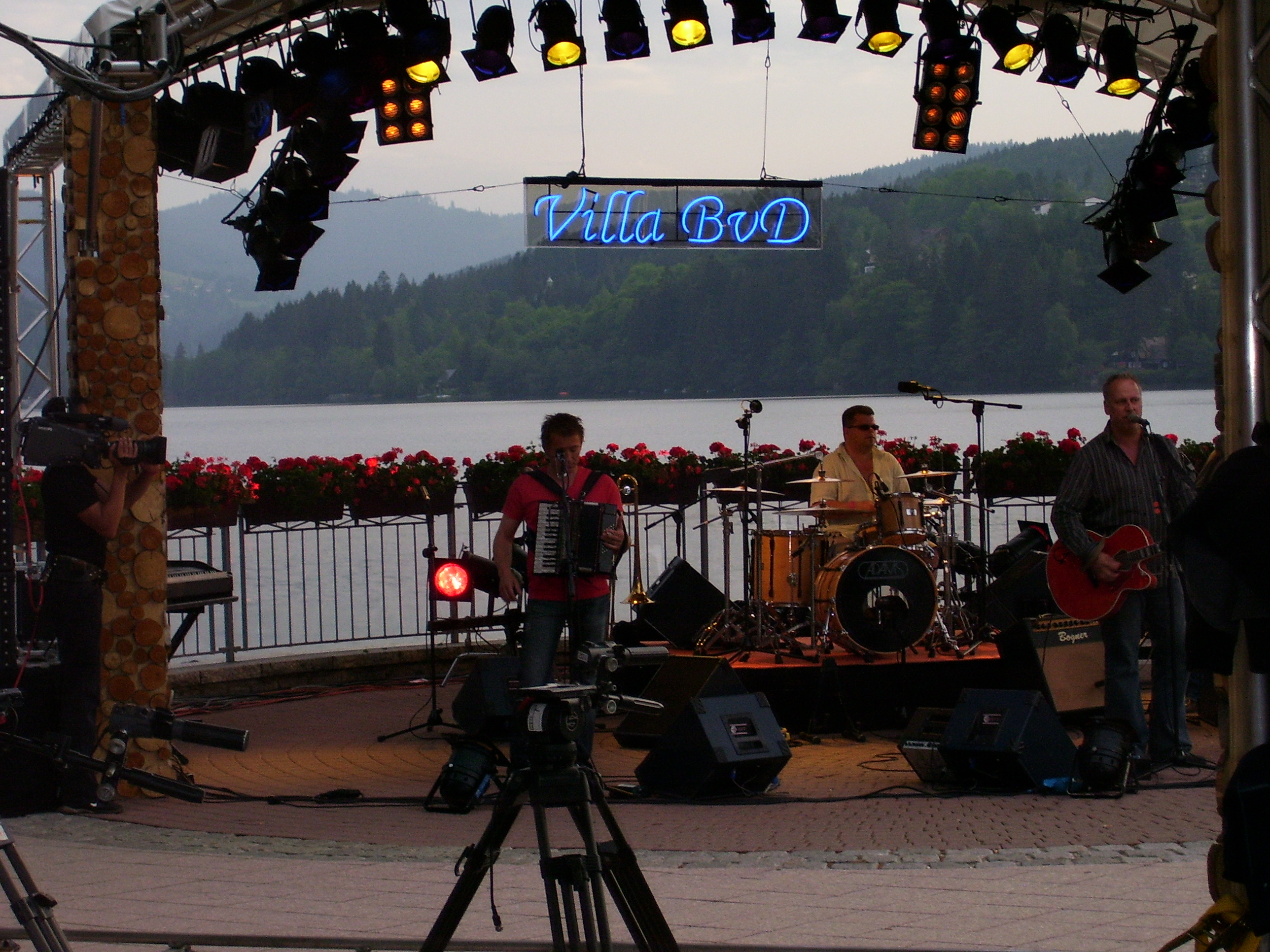 Eigen foto, gemaakt in juni 2006, BvD-podium met Rowwen Hèze